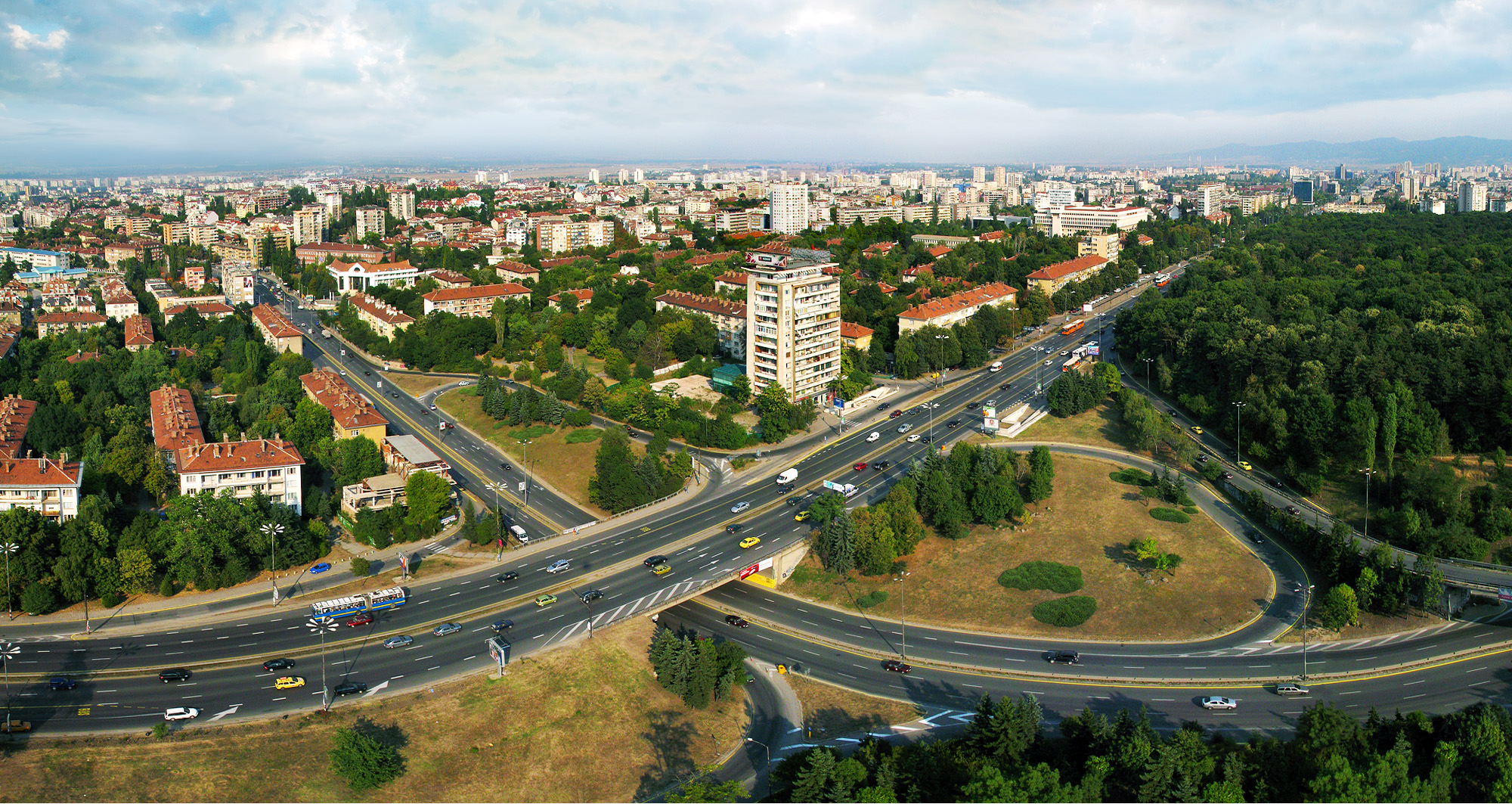 Shooting of infrastructure projects like this key road junction in Sofia, Bulgaria, are some of the application of the balloon aerial photography. Въздушните снимки от балон са подходящи за улавяне на инфраструктурни проекти, където е забранен ниският полет или застрояването не позволява други начини.